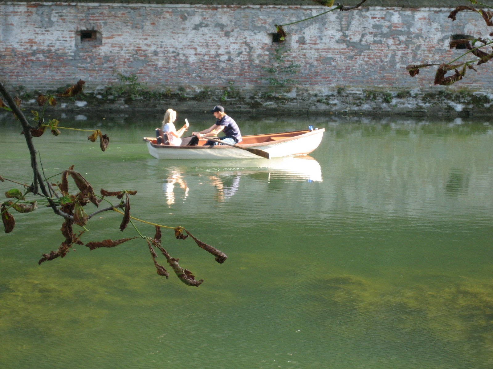 Kahnfahrt in Augsburg, ein Paar in einem Boot vor der mittelalterlichen Stadtmauer